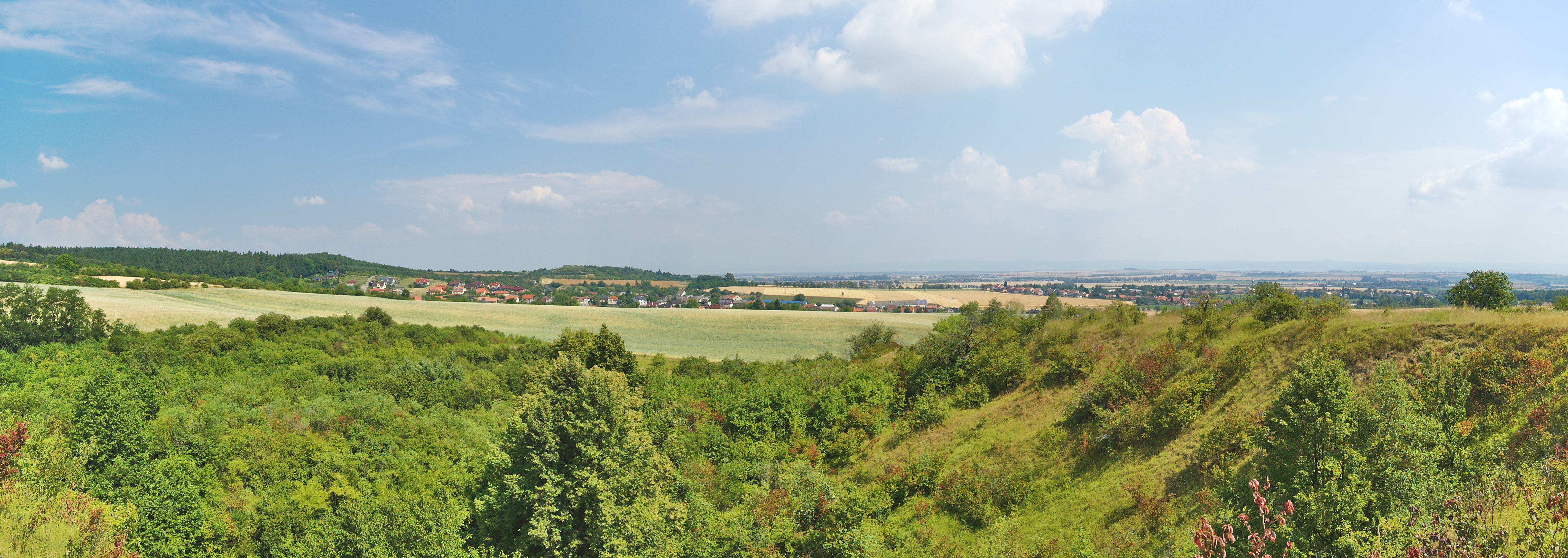 Přírodní památka Vápenice, Slatinky, okres Prostějov